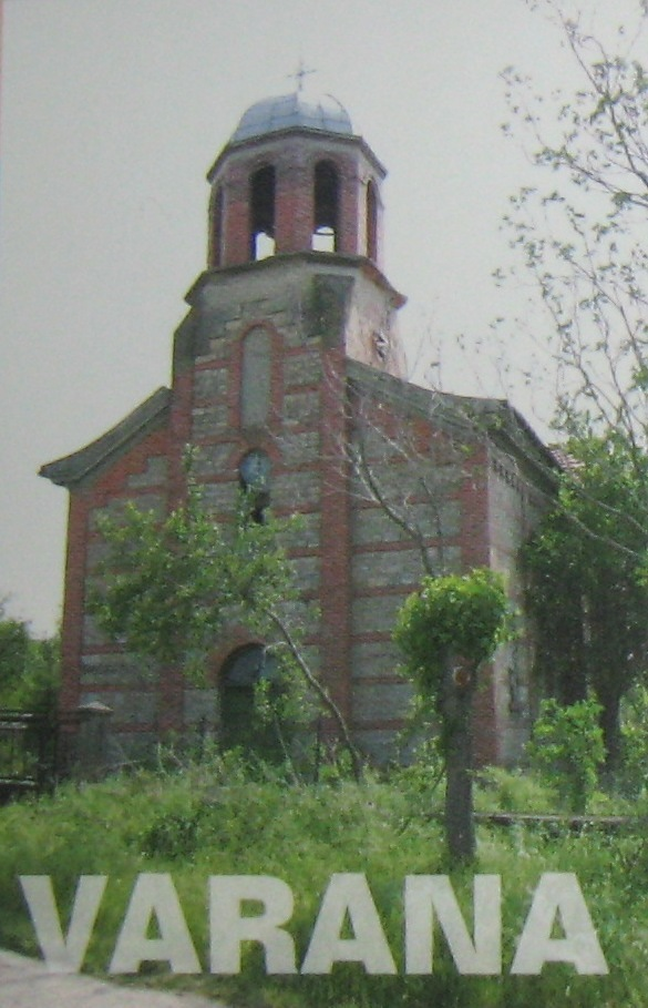 Църквата на село Варана